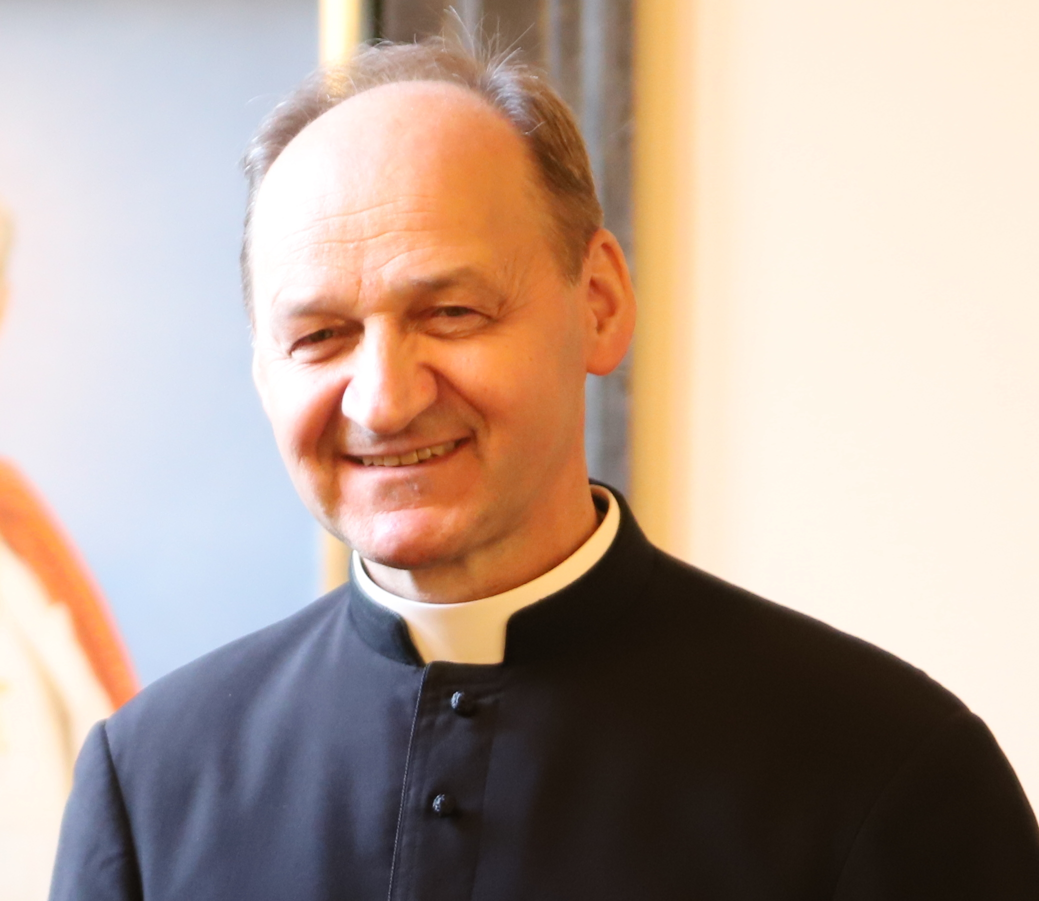 Ogłoszenie o mianowaniu dwóch nowych biskupów dla Archidiecezji Krakowskiej